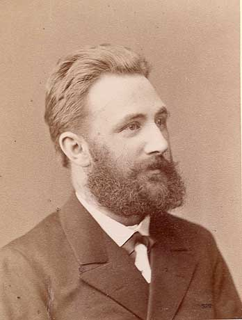 Portrait von Propst Ludwig Zimmermann